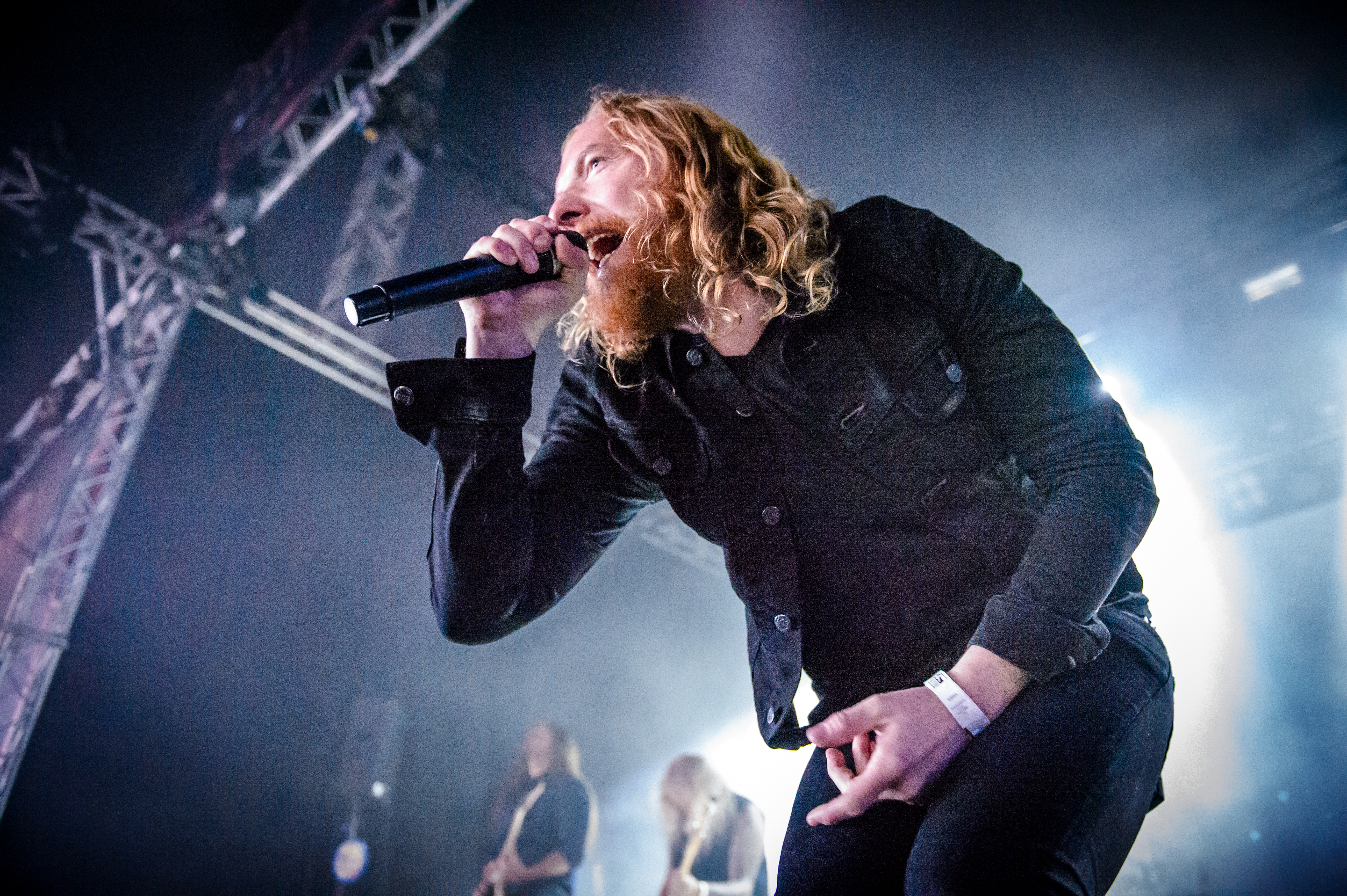 'Dong Open Air 2017; Neukirchen-Vluyn': 'Dark Tranquillity'